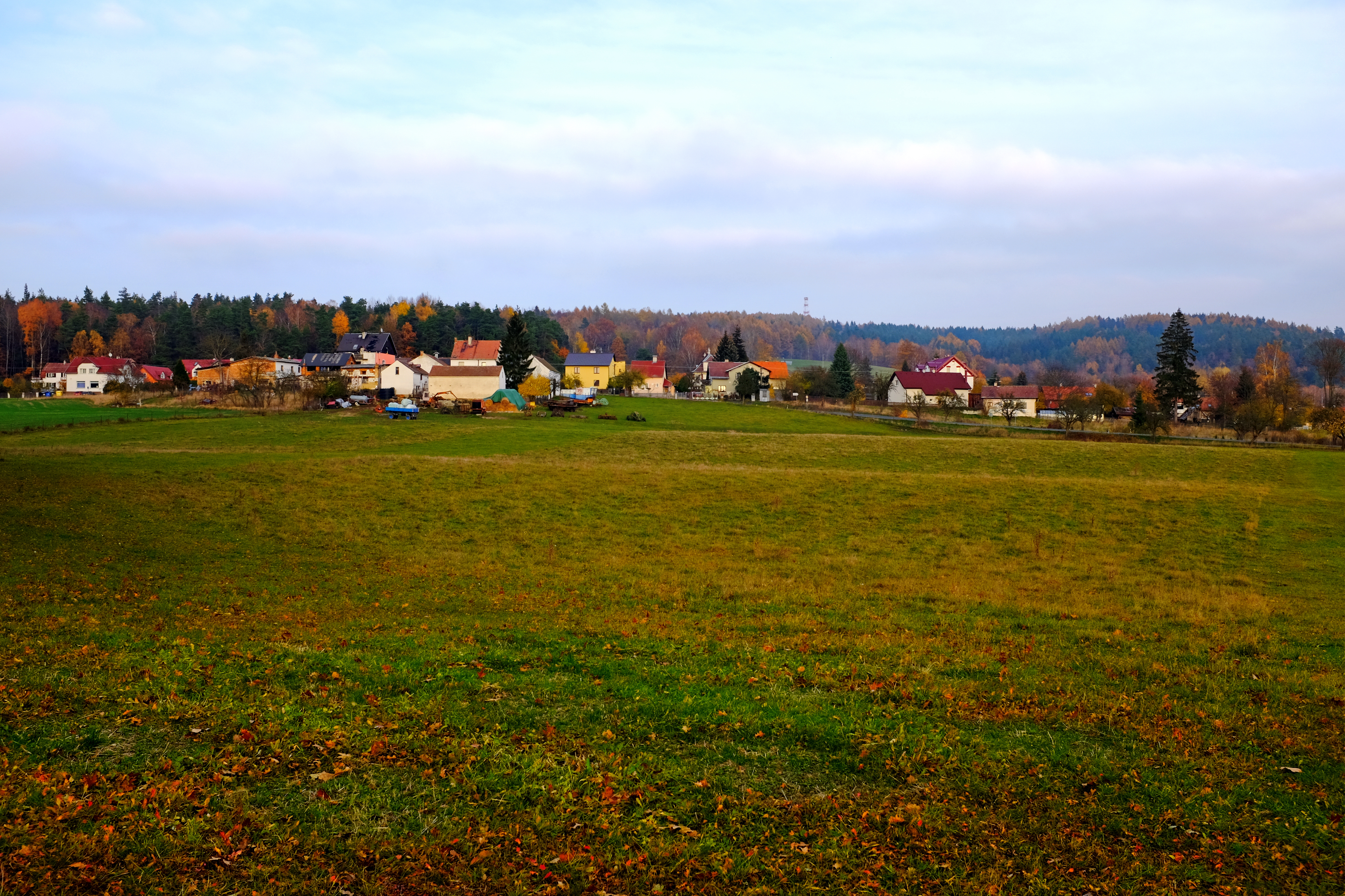 Horní Pochlovice, část obce Kaceřov, okres Sokolov